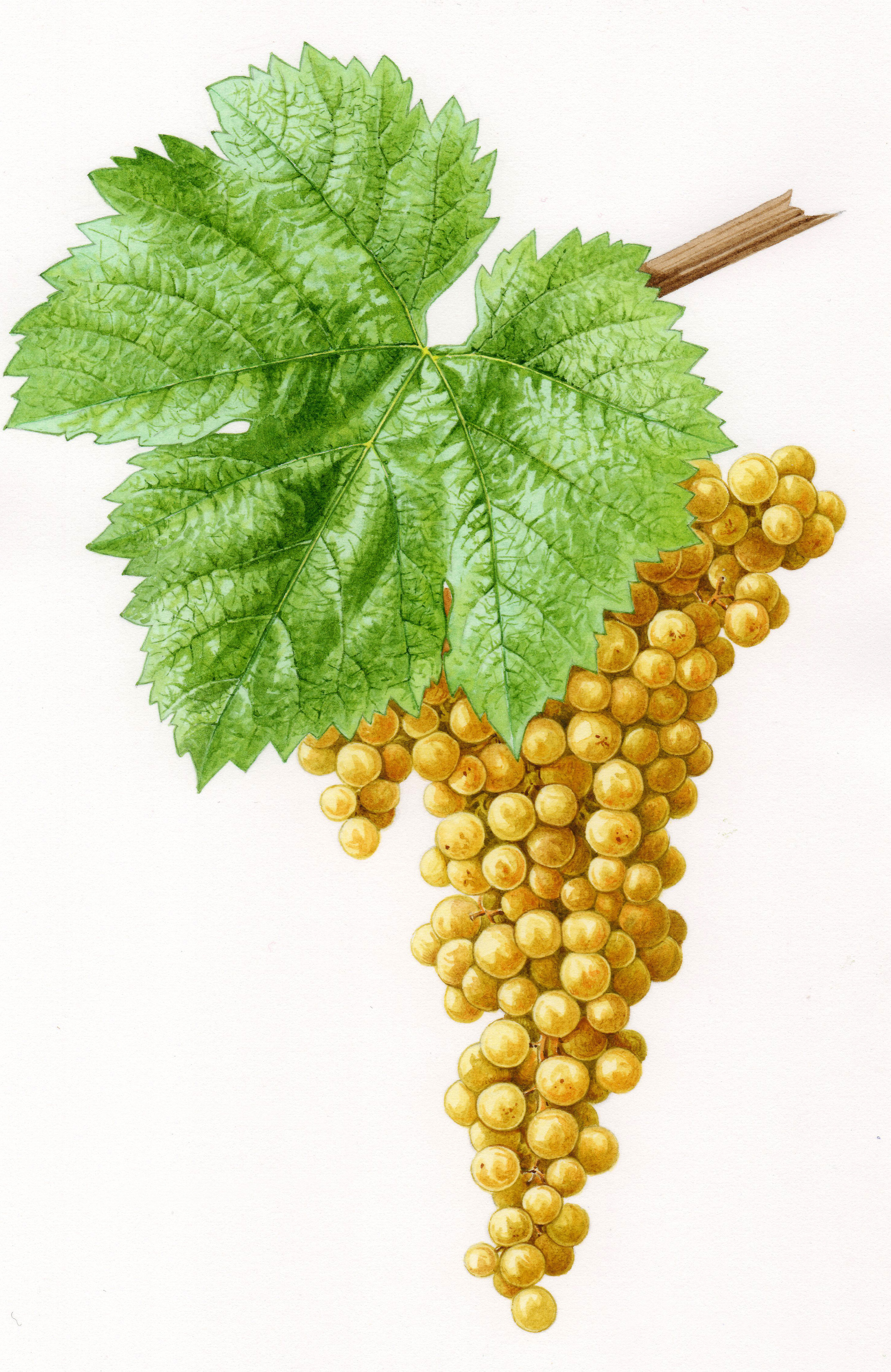 aquarelle originale, série des cépages de France (2001)